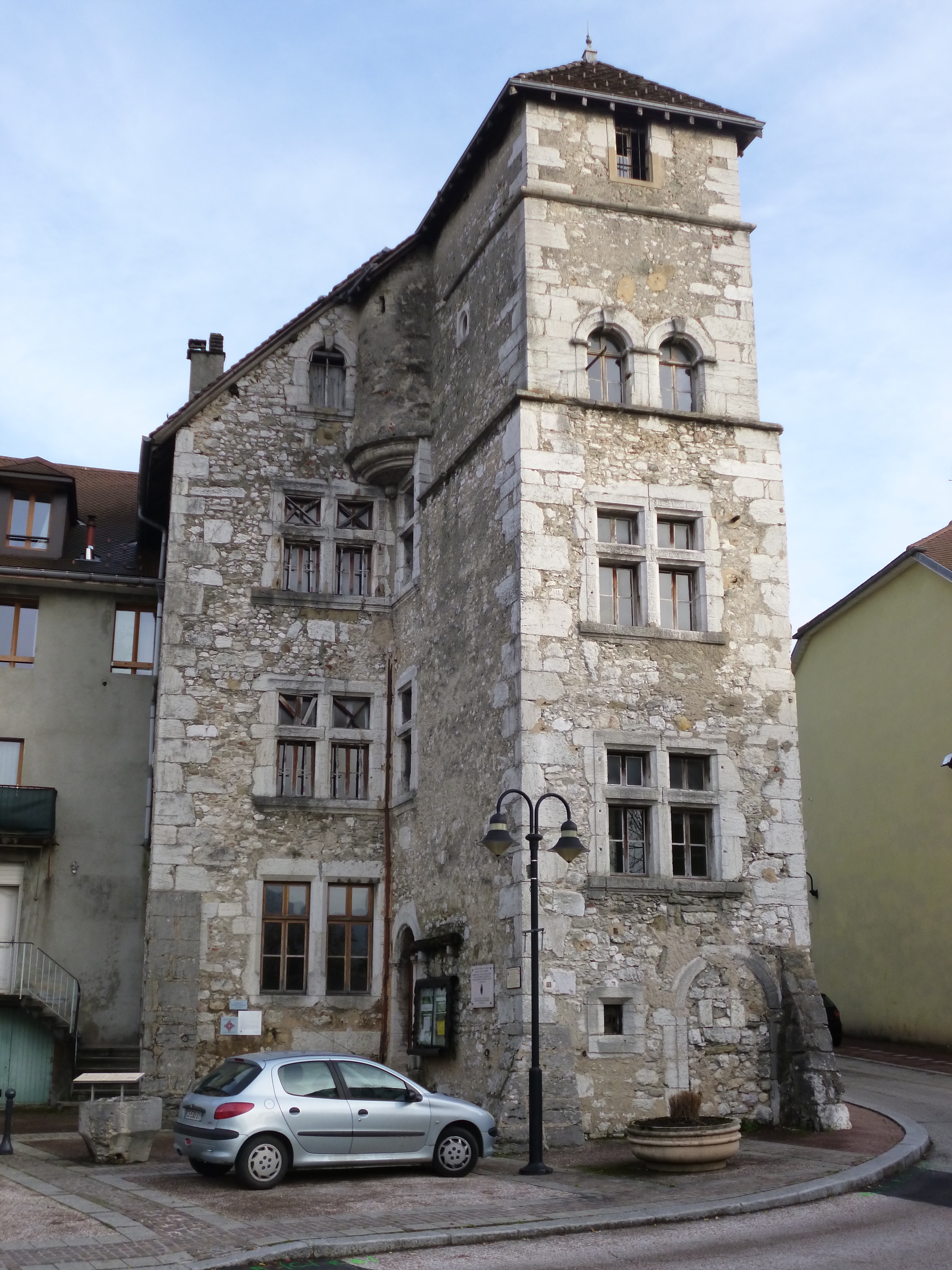 Hôtel de ville, ancienne commanderie de l'Ordre de Saint-Jean-de-Jérusalem Les Échelles, Savoie, France Novembre 2016